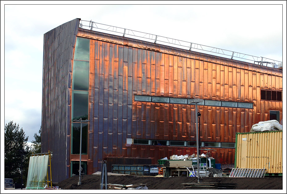 Klaukkalan kirkko rakennusvaiheessa ennen pinnan tummumista.